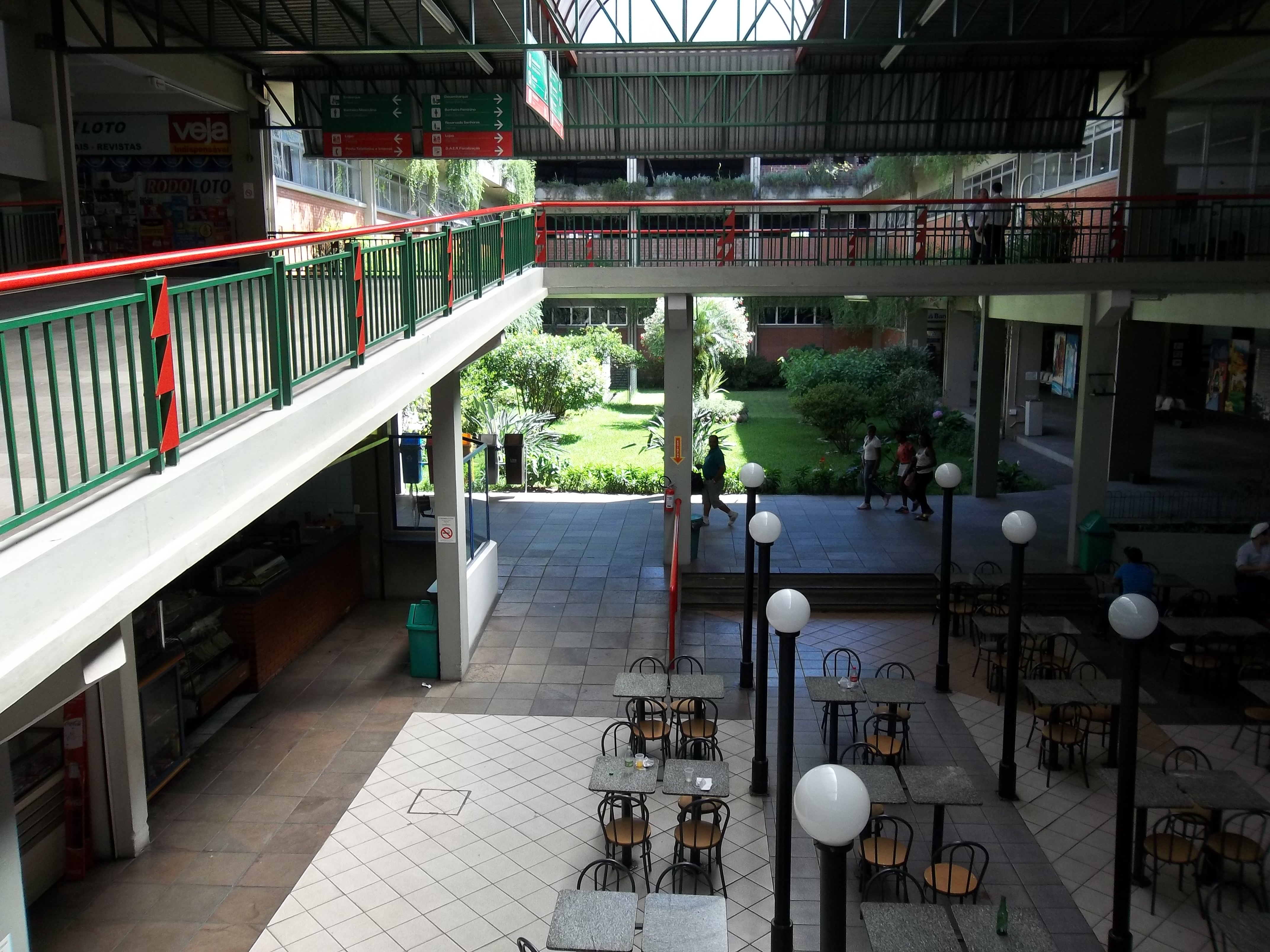 Estação Rodoviária de Santa Maria. Espaço interno, NS Lourdes, Sede, Santa Maria, Rio Grande do Sul, Brasil.